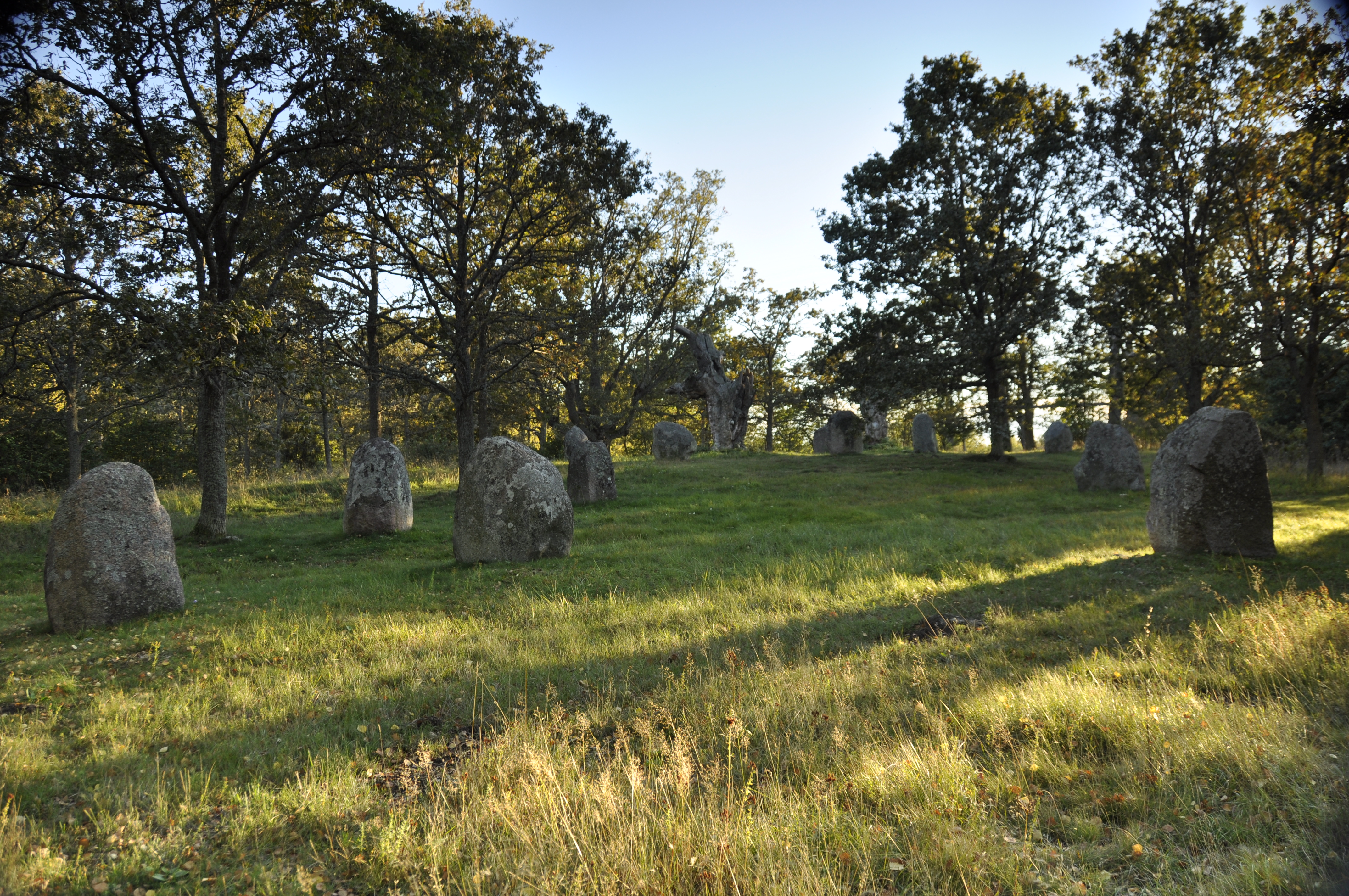 Domarring i Fölehagen, Kalmar.